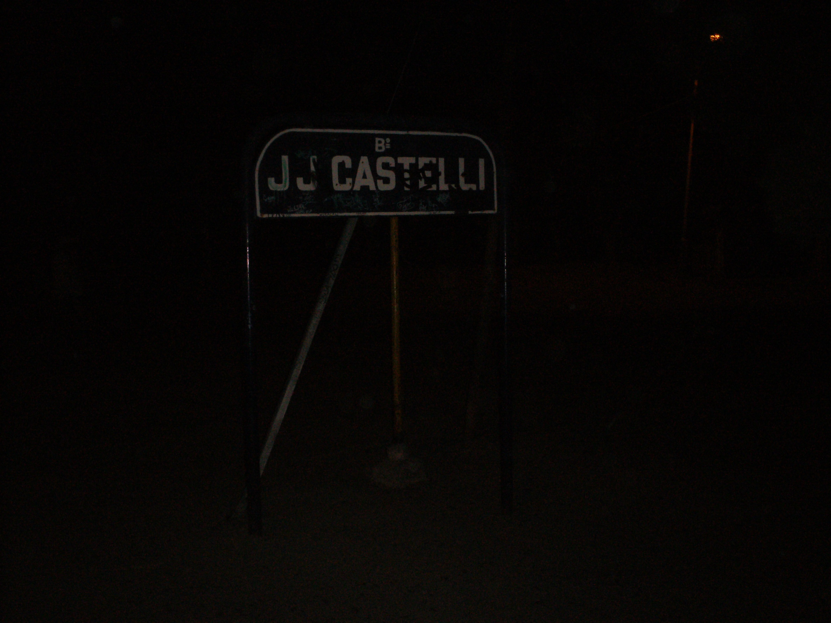 la carteleria de entrada en castelli